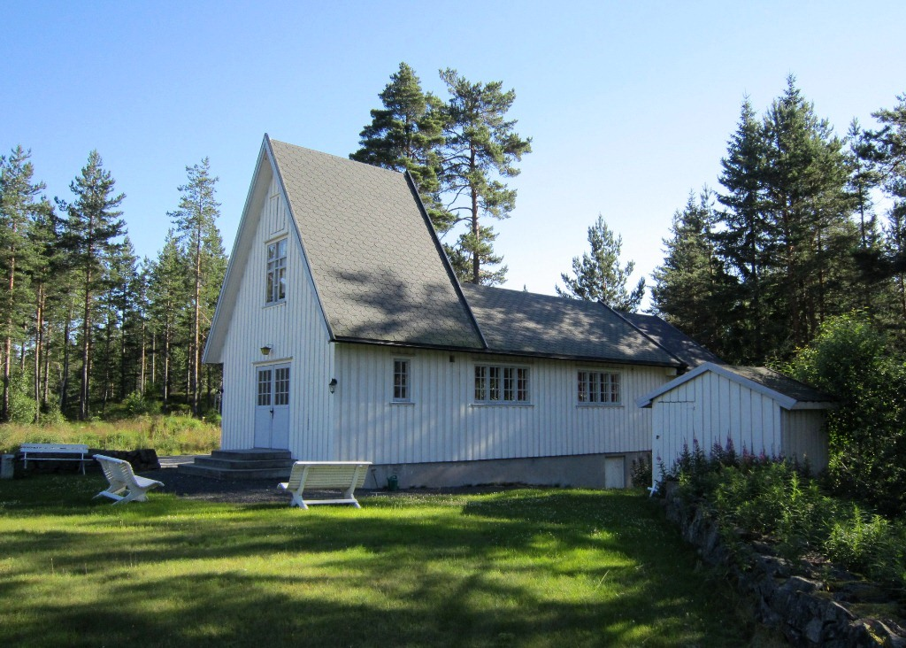 Felle kapell, Nissedal kommune, Telemark